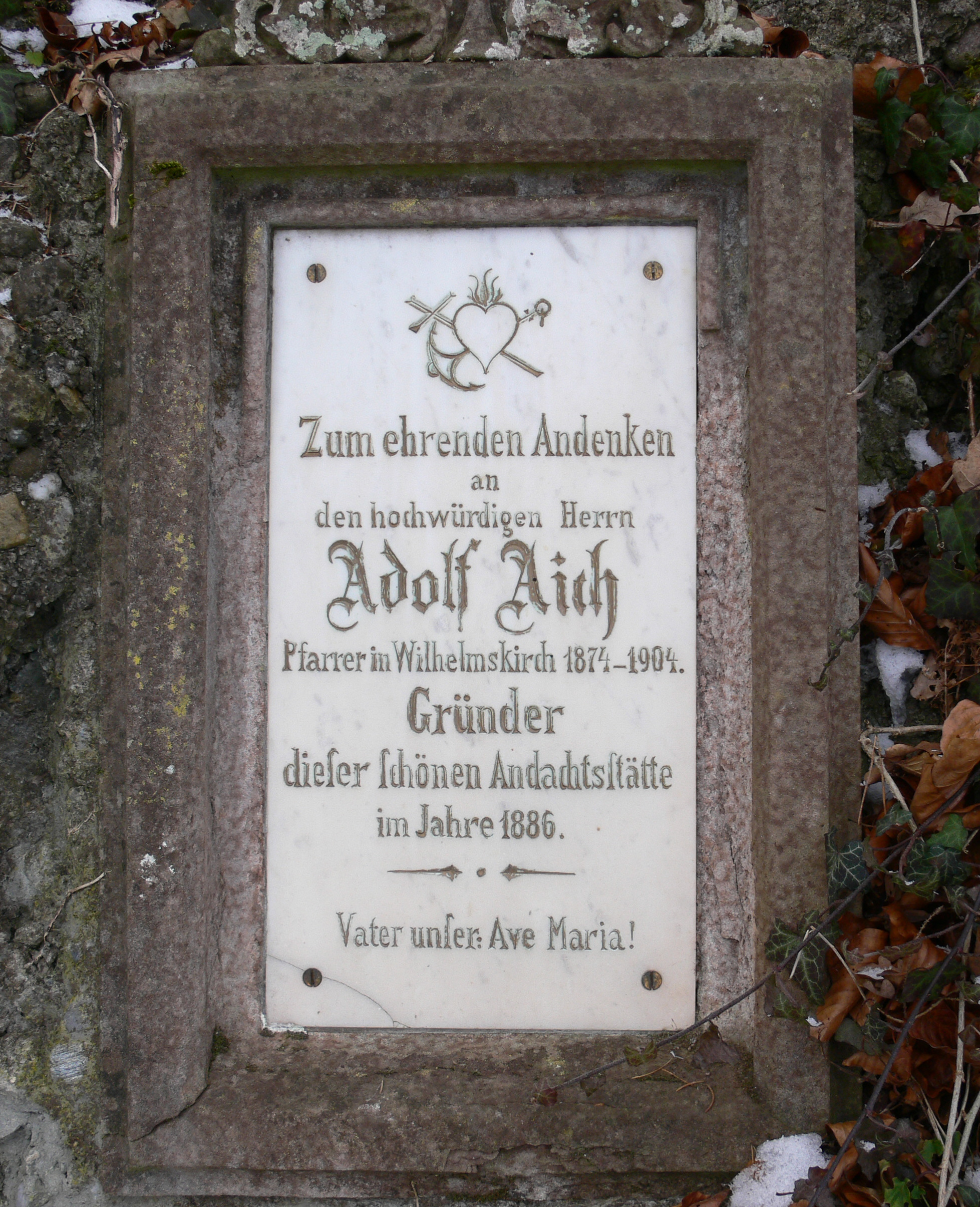 Andachtsstätte „Föhrenbühl“, Wolketsweiler, Horgenzell, Baden-Württemberg: Gedenktafel für den Begründer der Andachtsstätte, Pfarrer Adolf Aich.